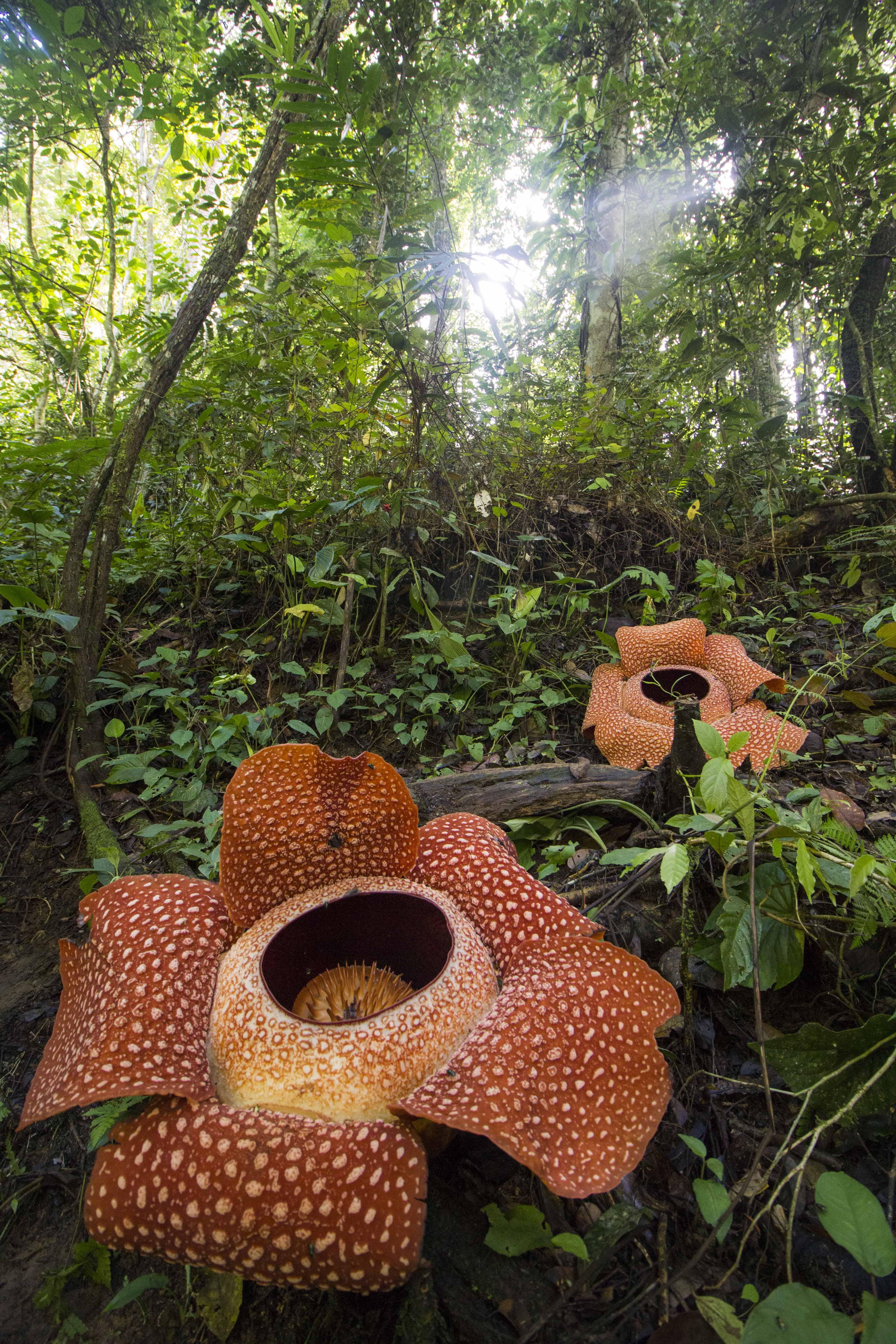 Dua Rafflesia arnoldii mekar di habitatnya di Hutan Lindung Bukit Daun Register 5 Desa Tebat Monok Kabupaten Kepahiang Provinsi Bengkulu pada 21 April 2015. Rafflesia arnoldii atau padma raksasa merupakan tumbuhan parasit obligat yang tumbuh pada batang liana (tumbuhan merambat) dari genus Tetrastigma. Rafflesia arnoldii pertama kali ditemukan pada tahun 1818 di hutan tropis Bengkulu oleh seorang pemandu yang bekerja pada Dr. Joseph Arnold yang sedang mengikuti ekspedisi Thomas Stanford Raffles, sehingga tumbuhan ini diberi nama sesuai sejarah penemunya yakni penggabungan antara Raffles dan Arnold. Rafflesia arnoldii tidak memiliki daun sehingga tidak mampu melakukan fotosintesis sendiri dan mengambil nutrisi dari pohon inangnya. Bentuk yang terlihat dari bunga Raflesia ini hanya bunganya saja yang berkembang dalam kurun waktu tertentu. Keberadaannya seakan tersembunyi selama berbulan-bulan di dalam tubuh inangnya hingga akhirnya tumbuh bunga yang hanya mekar seminggu. Bunga Raflesia adalah identitas provinsi Bengkulu dan sebagai salah satu puspa langka dari tiga bunga nasional Indonesia mendampingi puspa bangsa (melati putih atau Jasminum sambac) dan puspa pesona (anggrek bulan atau Phalaenopsis amabilis) berdasarkan Kepres No 4 Tahun 1993 tentang Satwa dan Bunga Nasional.